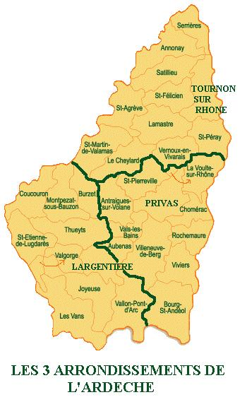 Les trois arrondissements de l’Ardèche et leurs cantons, de 1800 à 2007.